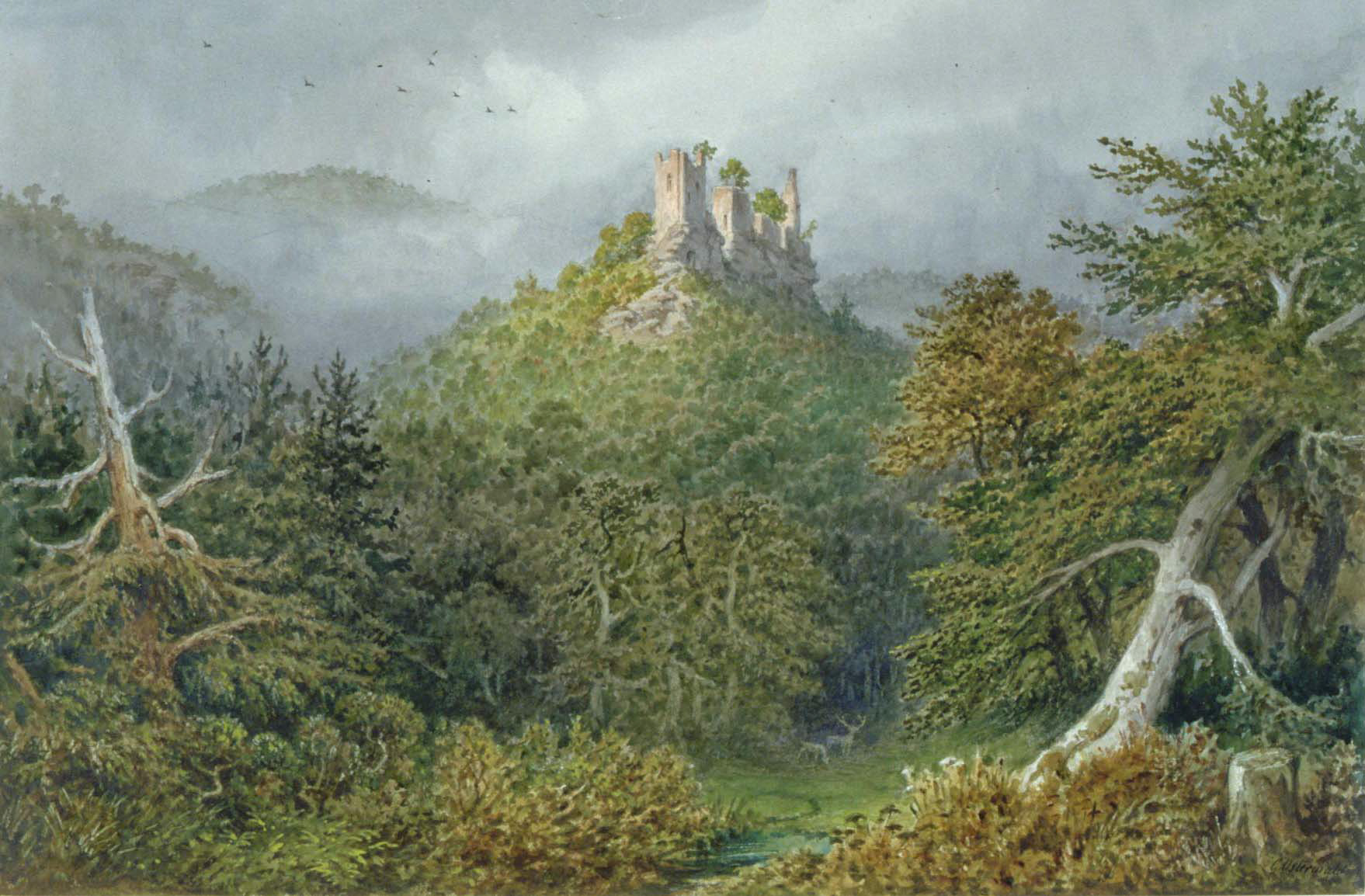 Ansicht der Burgruine Wasigenstein im Elsass